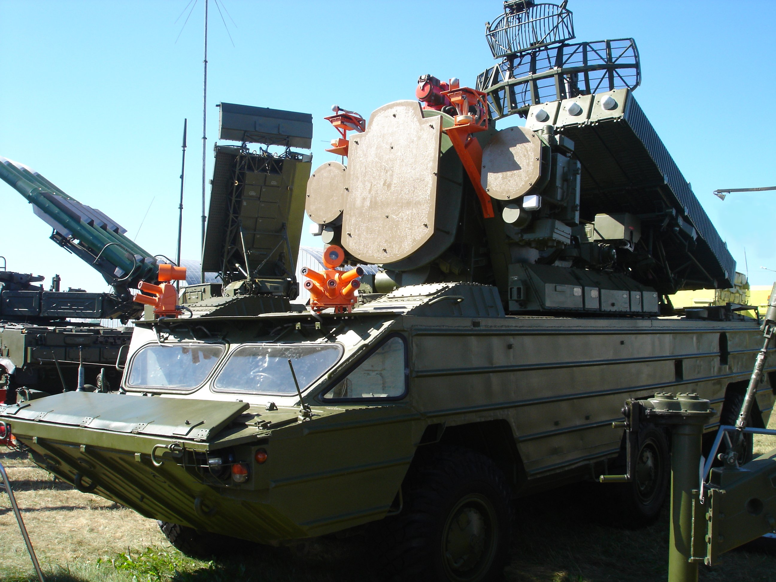 9K33M3 "Osa-AKM" SAM system MAKS, Zhukovskiy, 2005.